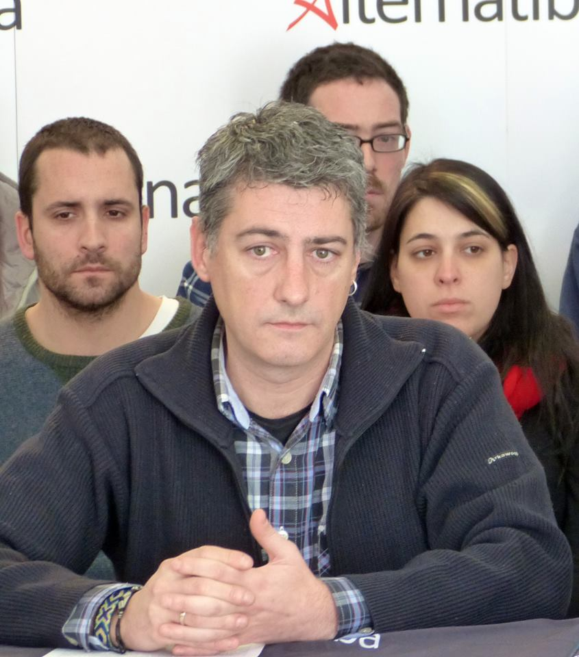 El portavoz de Alternatiba, Oskar Matute, en una rueda de prensa el 10 de febrero de 2015.